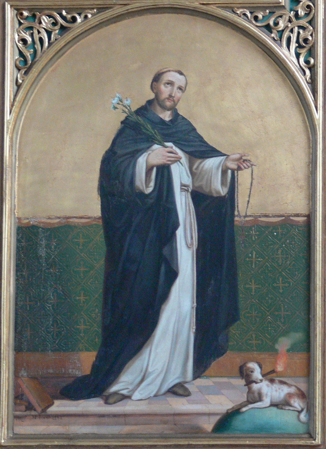 Kath. Pfarrkirche St. Johannes Baptista, Wuchzenhofen, Stadt Leutkirch im Allgäu Rechter Seitenaltar, Gemälde "Hl. Dominikus" und "Hl. Katharina von Siena"